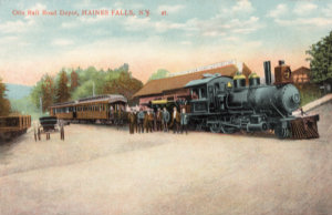 Catskill and Tannersville Railway